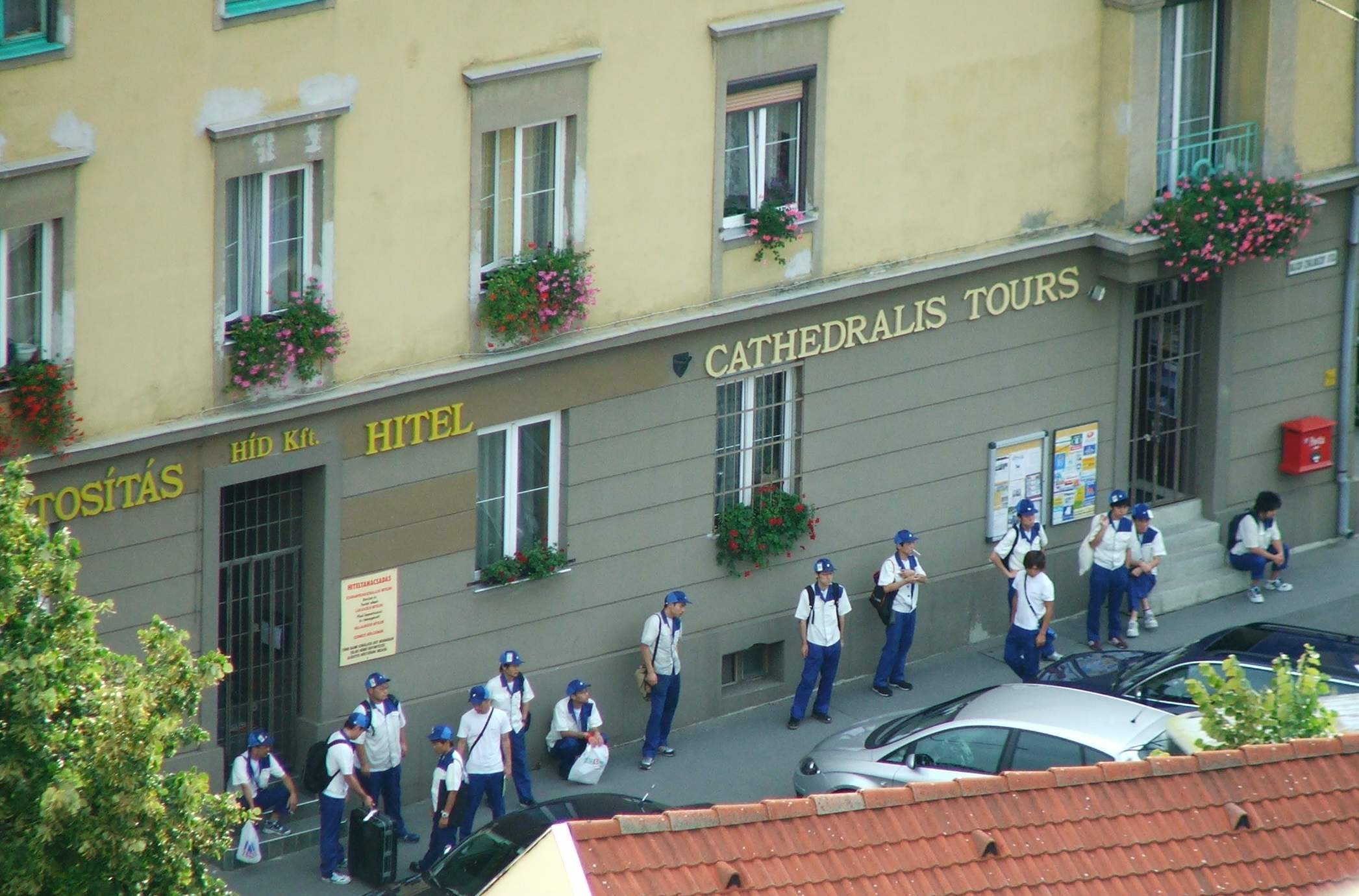 Japanese Suzuki-workers in Esztergom, Hungary